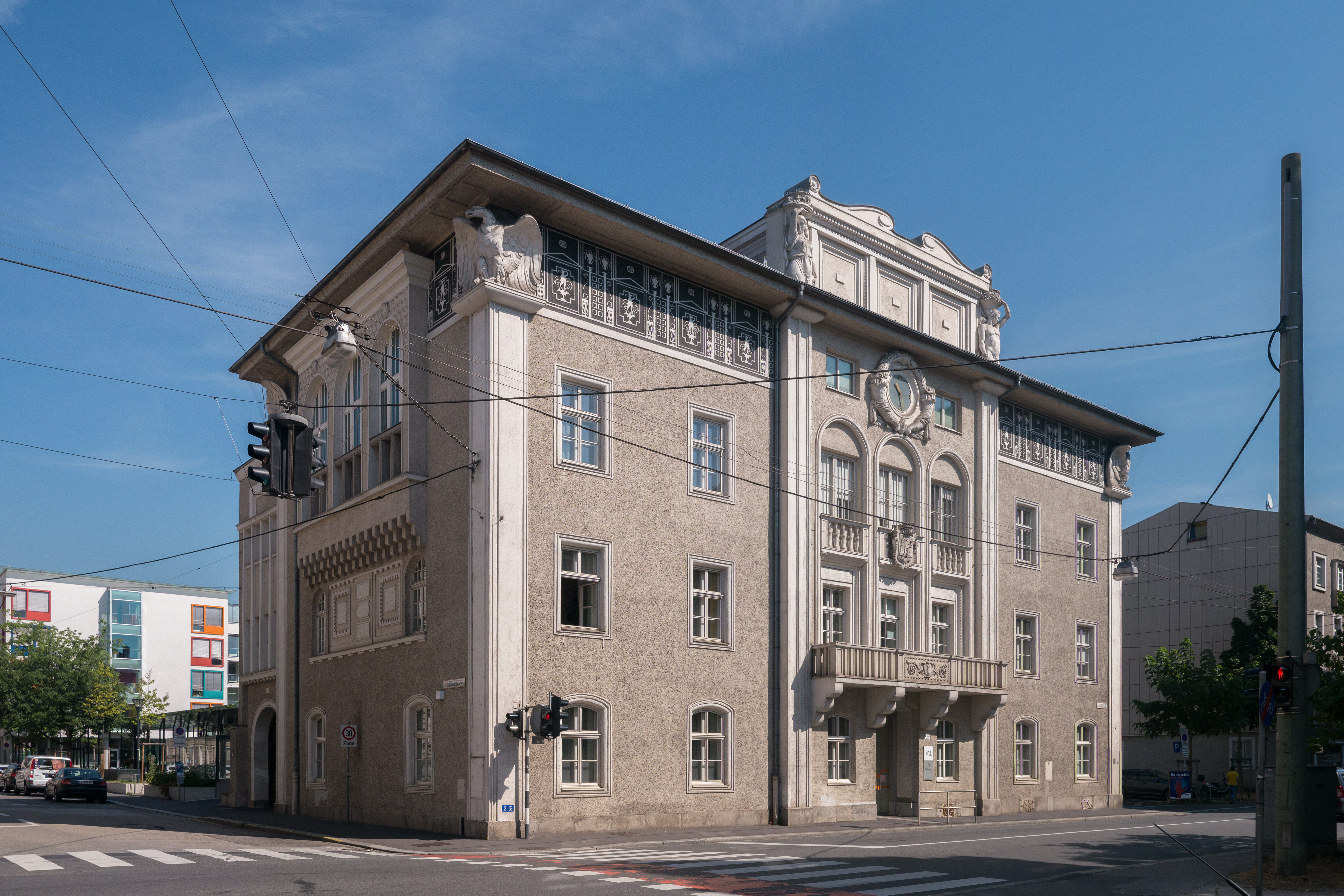 Ehem. Rathaus